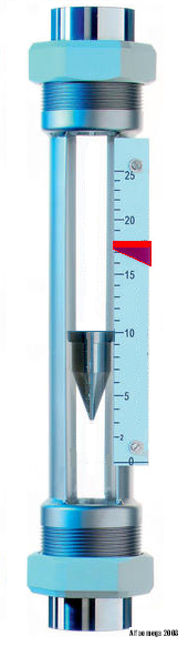 einfacher Schwebekörper-Durchflussmesser